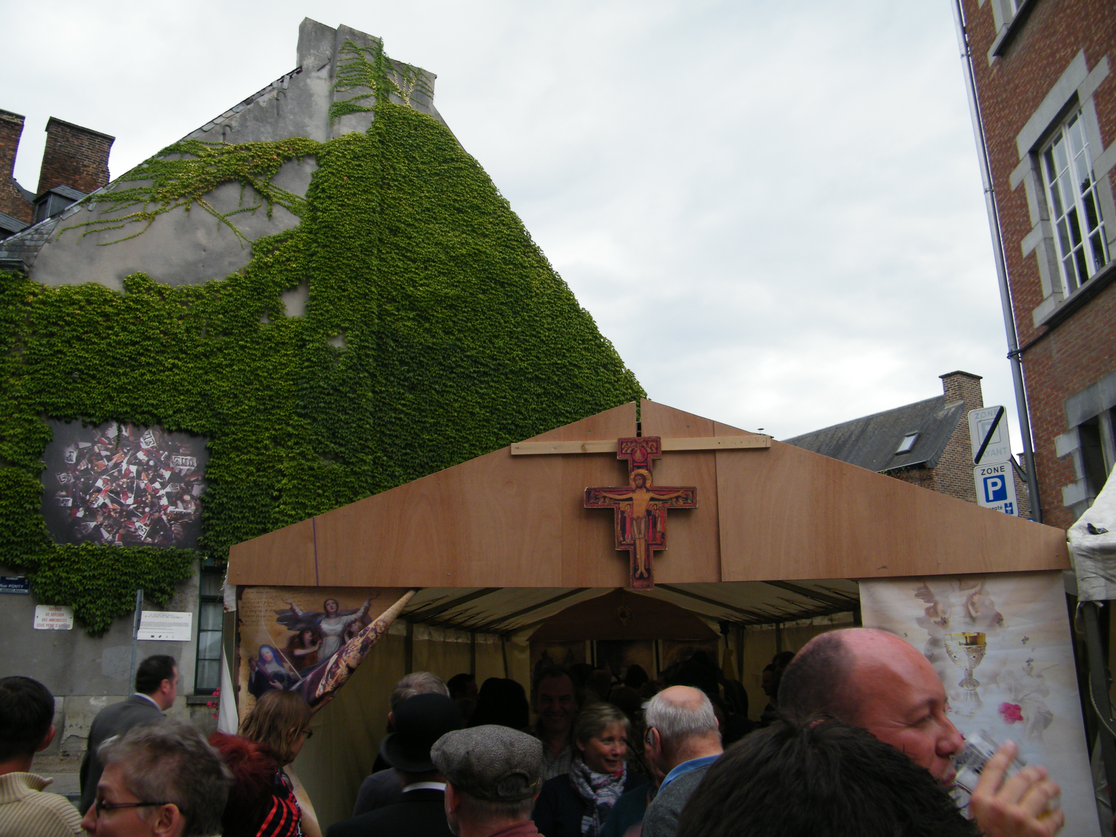 Chapelle folklorique temporaire utilisée pour l'enterrement de l’Arsouille, durant les fêtes de Wallonie 2016, à Namur. Elle est située rue Saint-Nicolas.